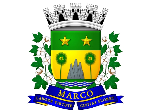 Brasão do Município de Marco, criado com a Lei Nº 086/11, de 12 de maio de 2011, que dispõe sobre a Revitalização do Brasão do Município de Marco.